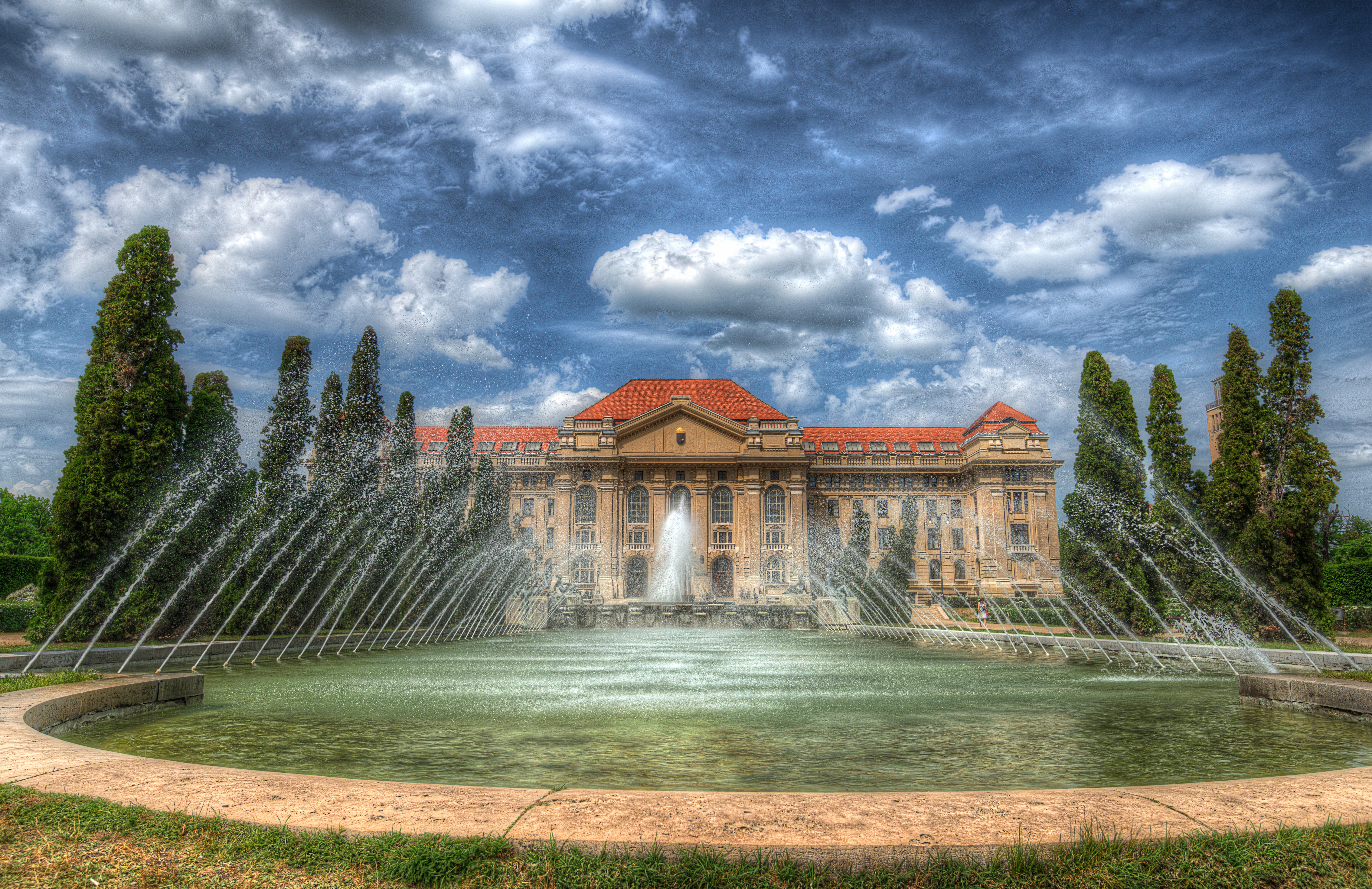 Debreceni Egyetem This is a photo of a monument in Hungary. Identifier: 5228